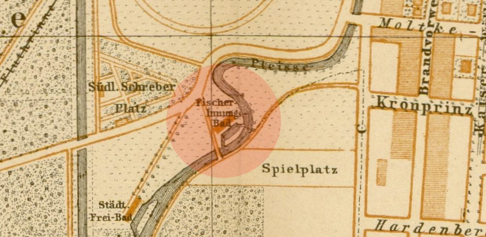 Das Germaniabad Leipzig noch als Fischer-Innungs-Bad auf einem Ausschnitt aus einem Leipziger Stadtplan von 1890